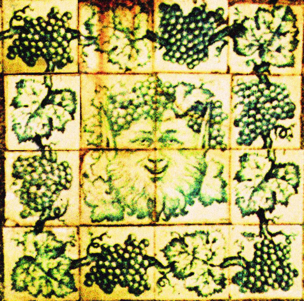 Azulejos bacchiques de la région des vinhos verdes XVIIIe s